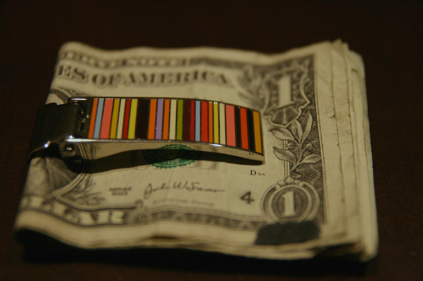 Boardwalk-Geldklammer